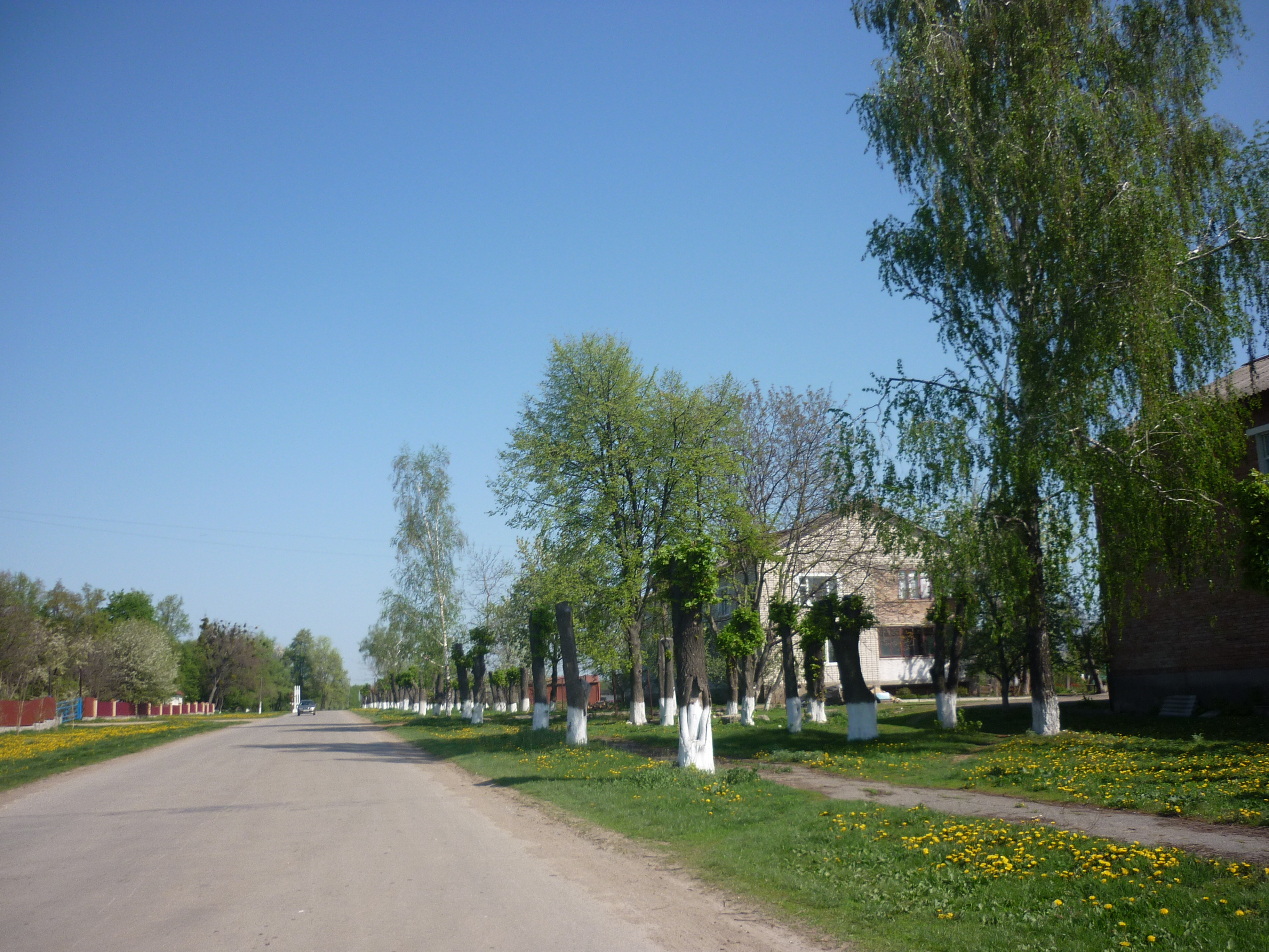 Вулиця Леніна в селі Паланка Уманського району